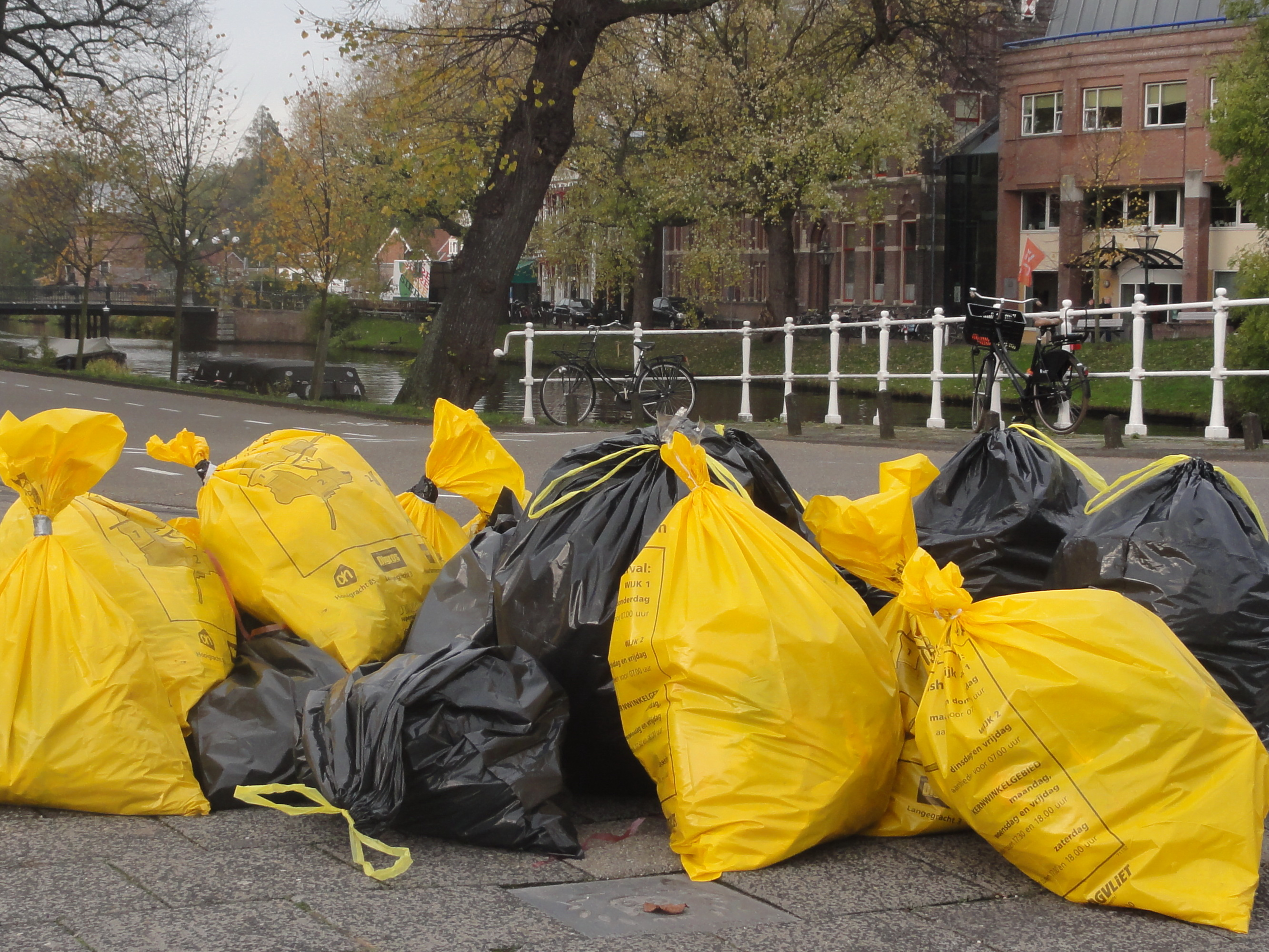 In Leiden wordt het gebruik van gele zakken gepromoot. Die zijn wat sterker en zouden de kans op stukmaken door meeuwen op zoek naar voedsel belangrijk verkleinen. En daarmee blijft de stad schoner.